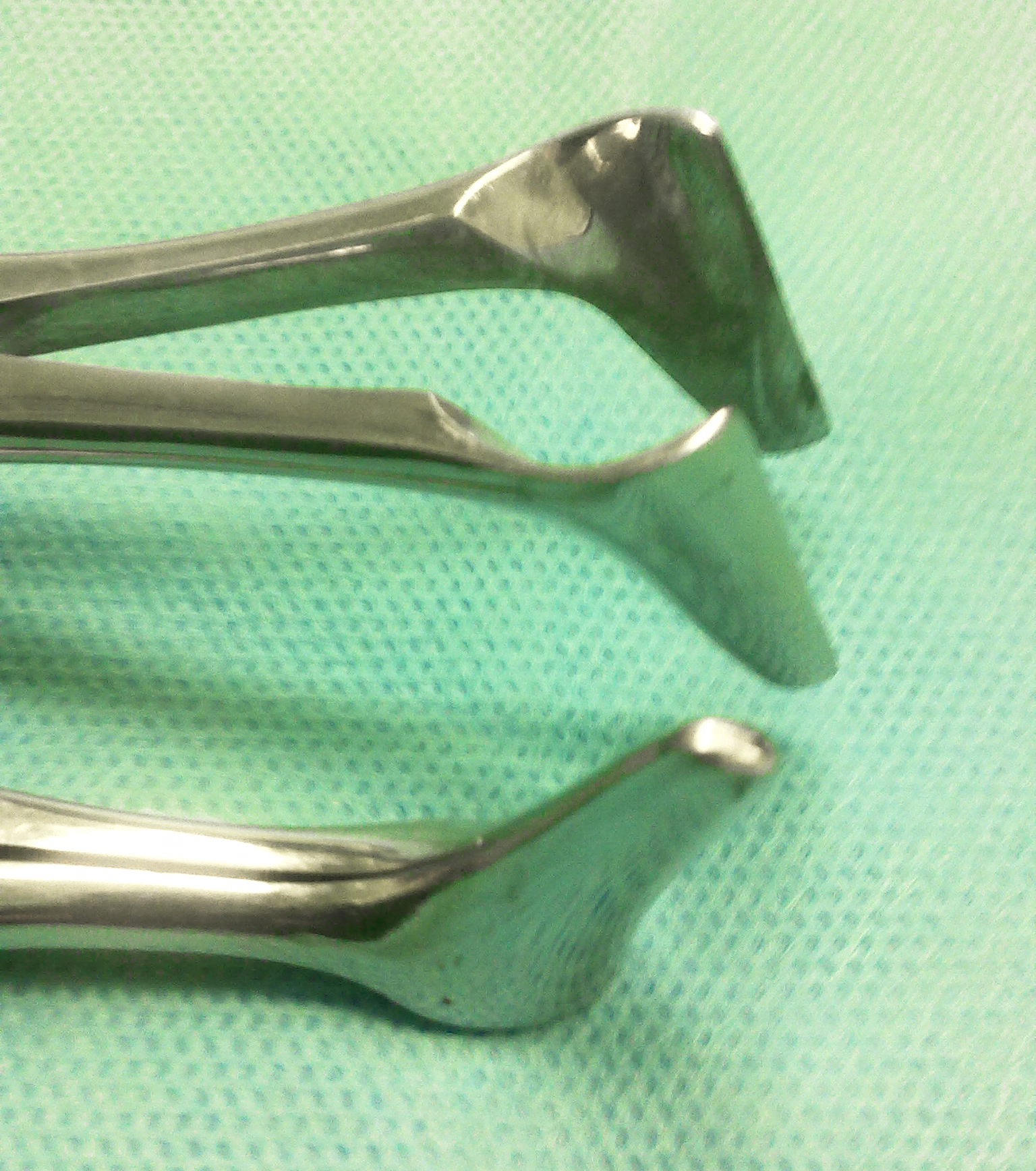 اسپکولوم بینیːوسیله ای است با تیغه های بلند و نازک که با کنار زدن دیواره بینی، باعث نمایان شدن حفره بینی می شود.